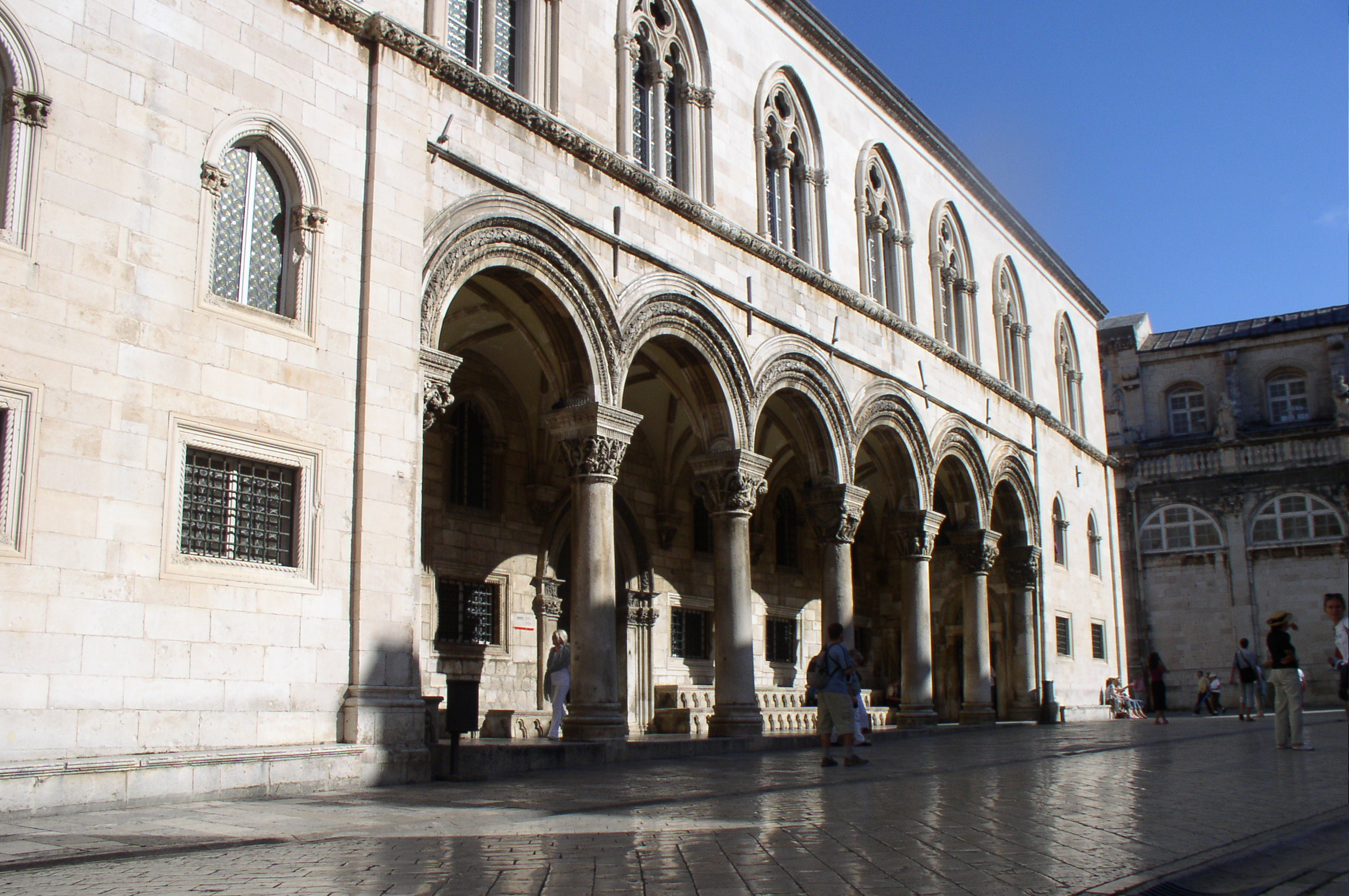 Pałac Rektorów w Dubrowniku z XV wieku